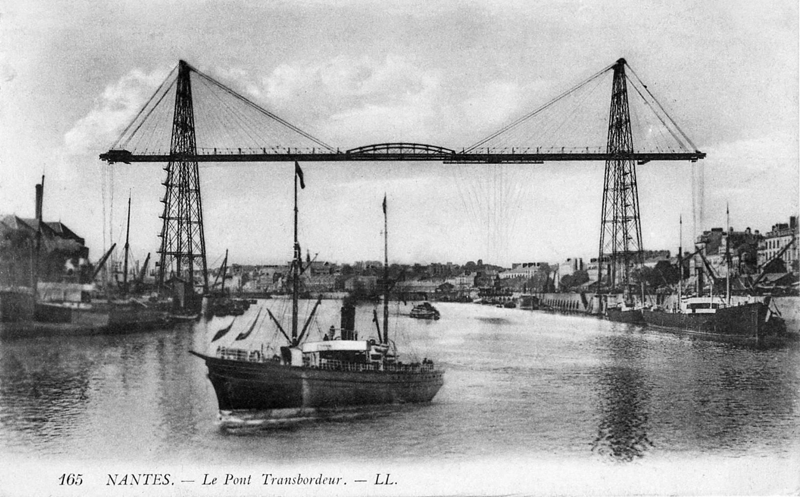 CP n° 165Le pont transbordeur de Nantes